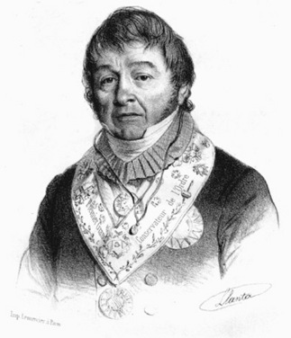 portrait of Marc Bédarride